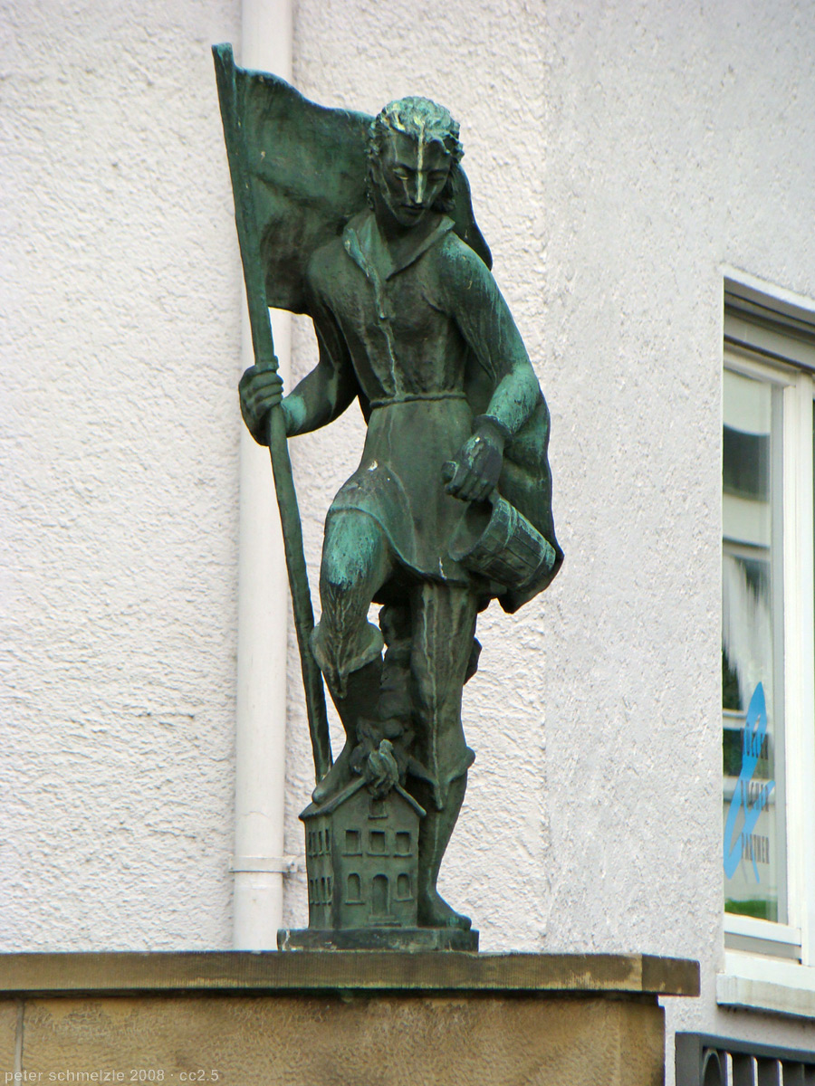 Skulptur des Heiligen Florian in der Moltkestraße in Heilbronn